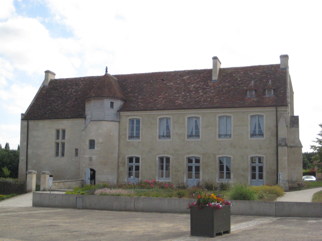 Manoir du Domaine de la Baronnie de Bretteville-sur-Odon (14), côté cour